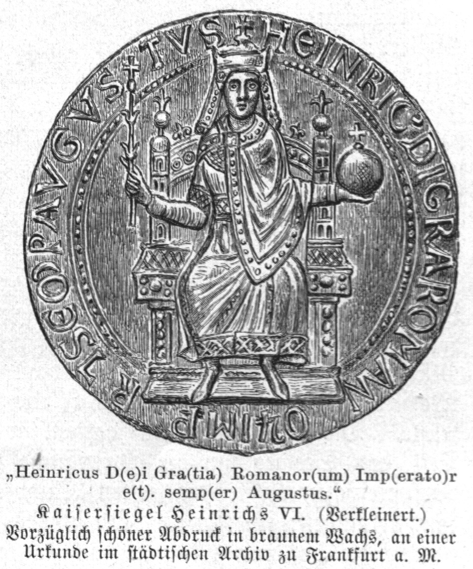 Siegel Kaiser Heinrichs VI.